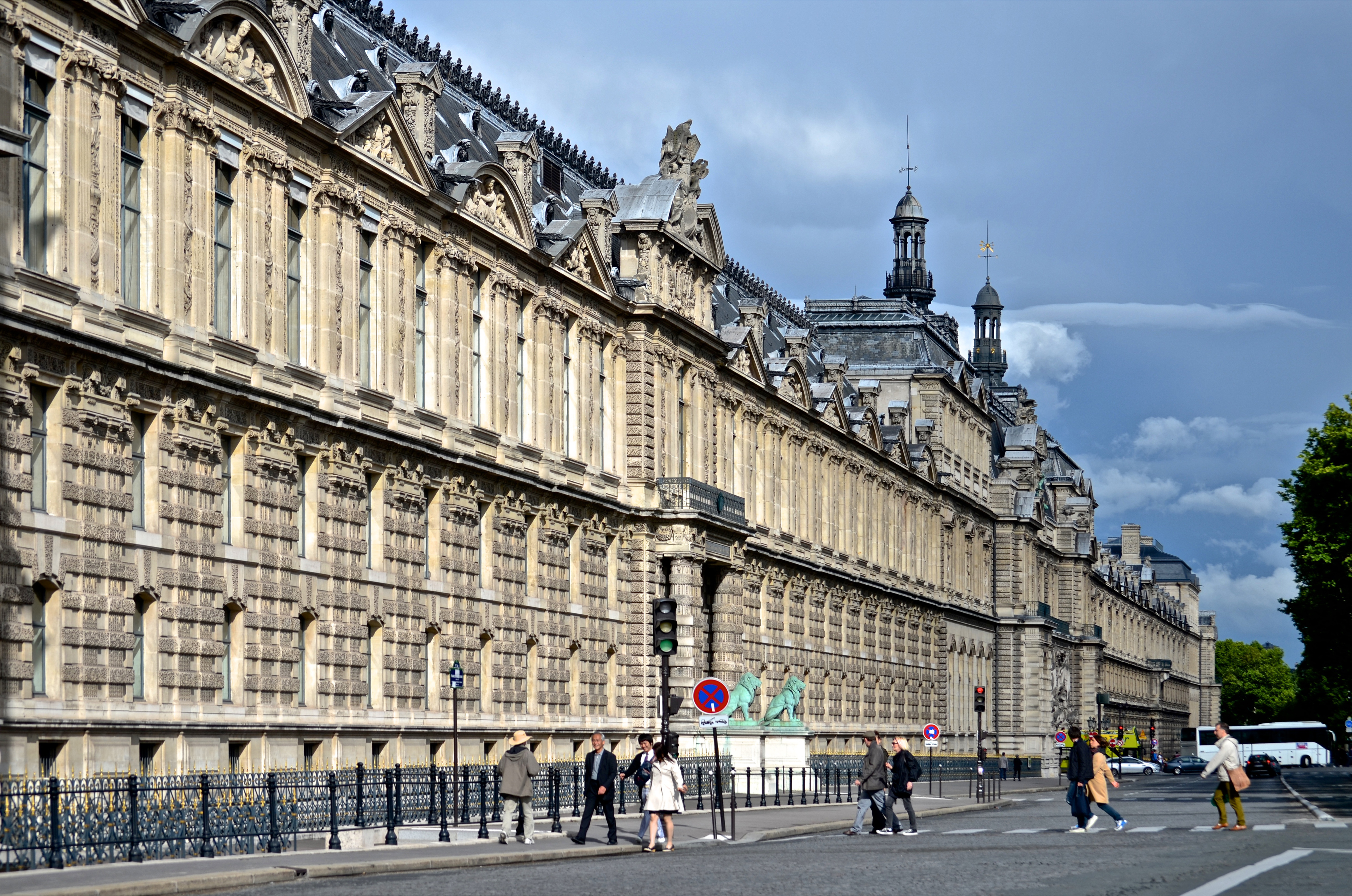 Grande Galerie du Louvre, south facade of the aile de Flore, porte des Lions, quai François Mitterrand, Paris, France.